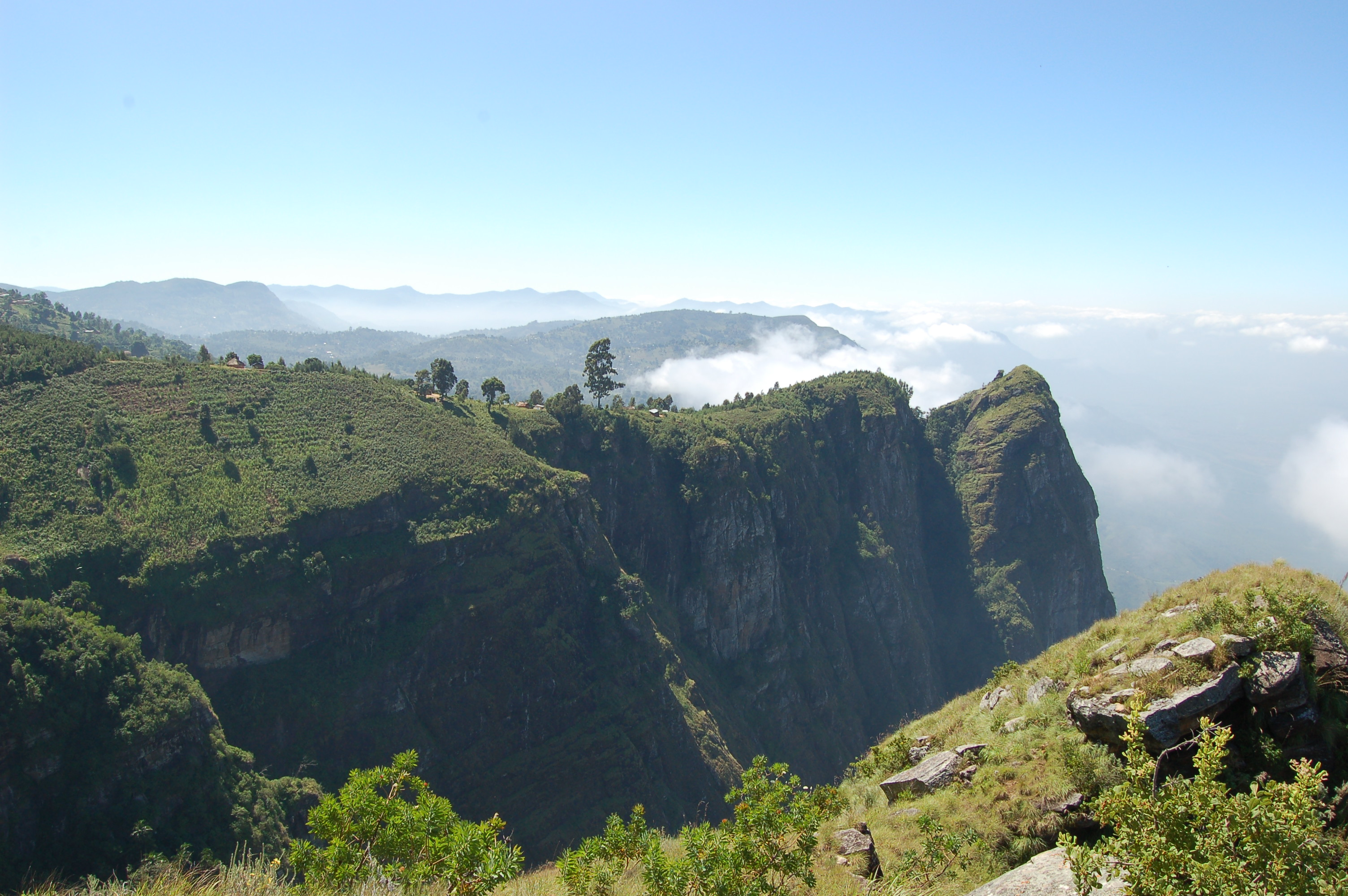 Usambara Mountains, Tanzania